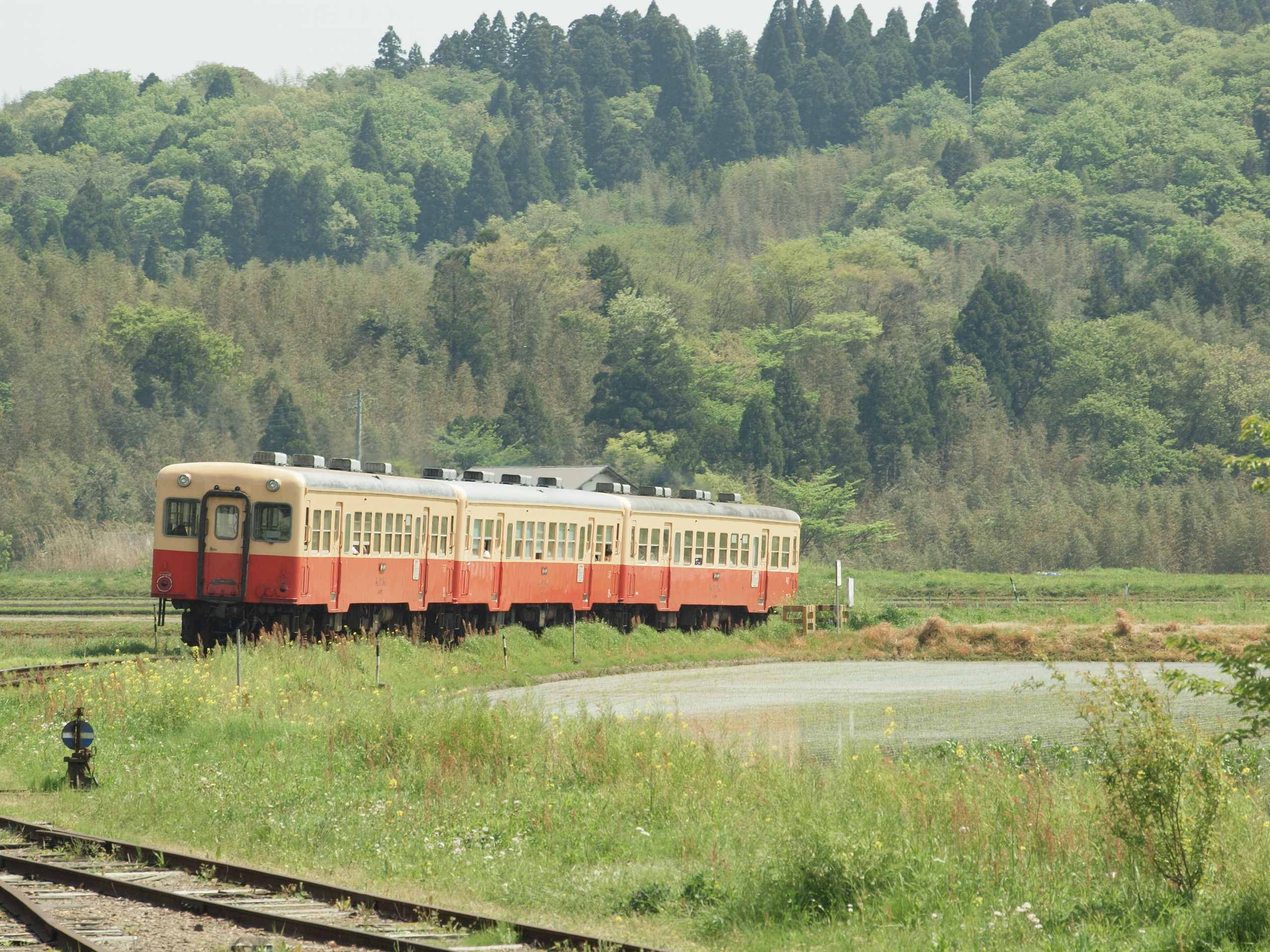 ゆるりと行く